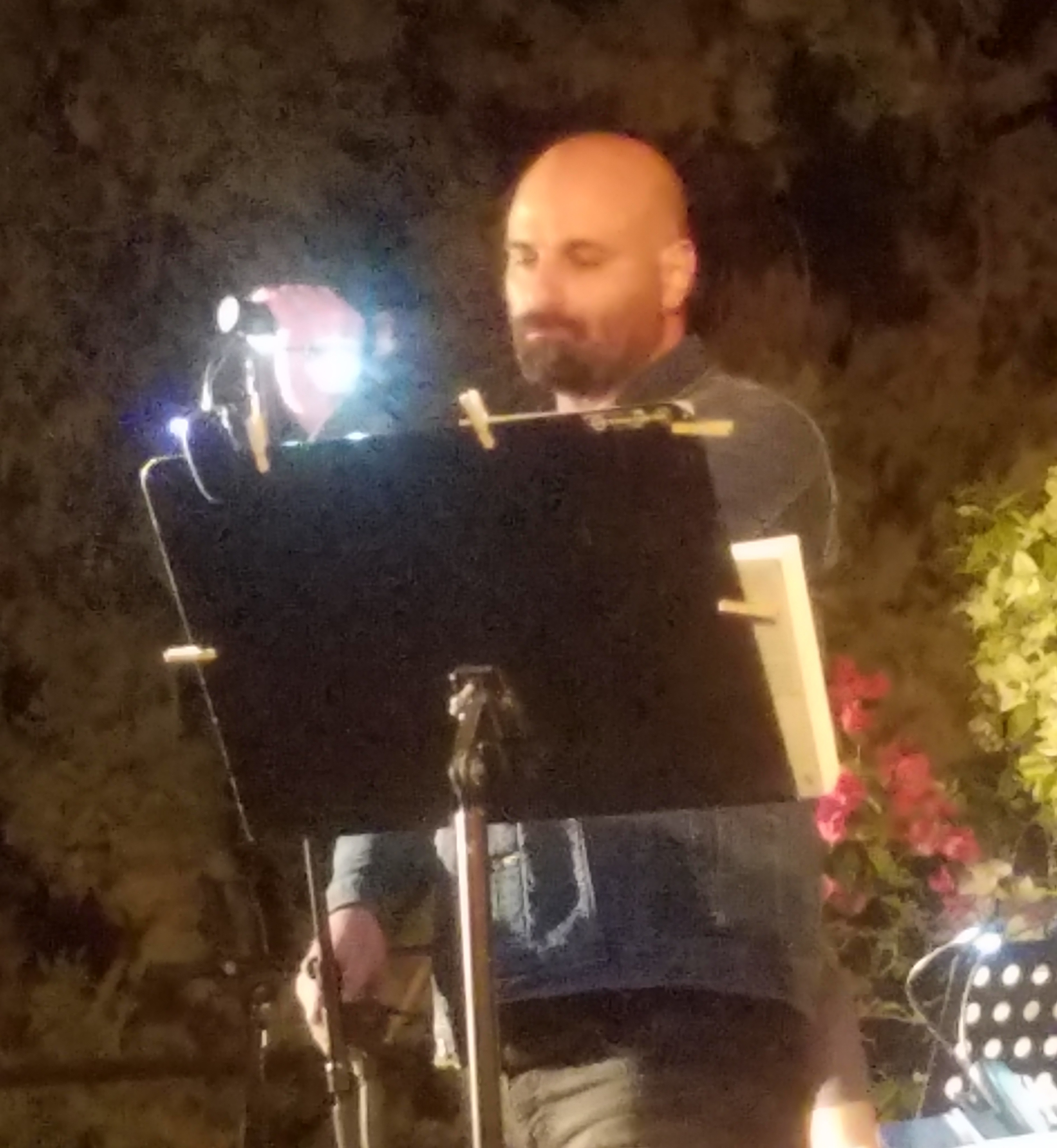 המשורר אודי שרבני מקריא שירה במשכנות שאננים בירושלים, מאי 2019